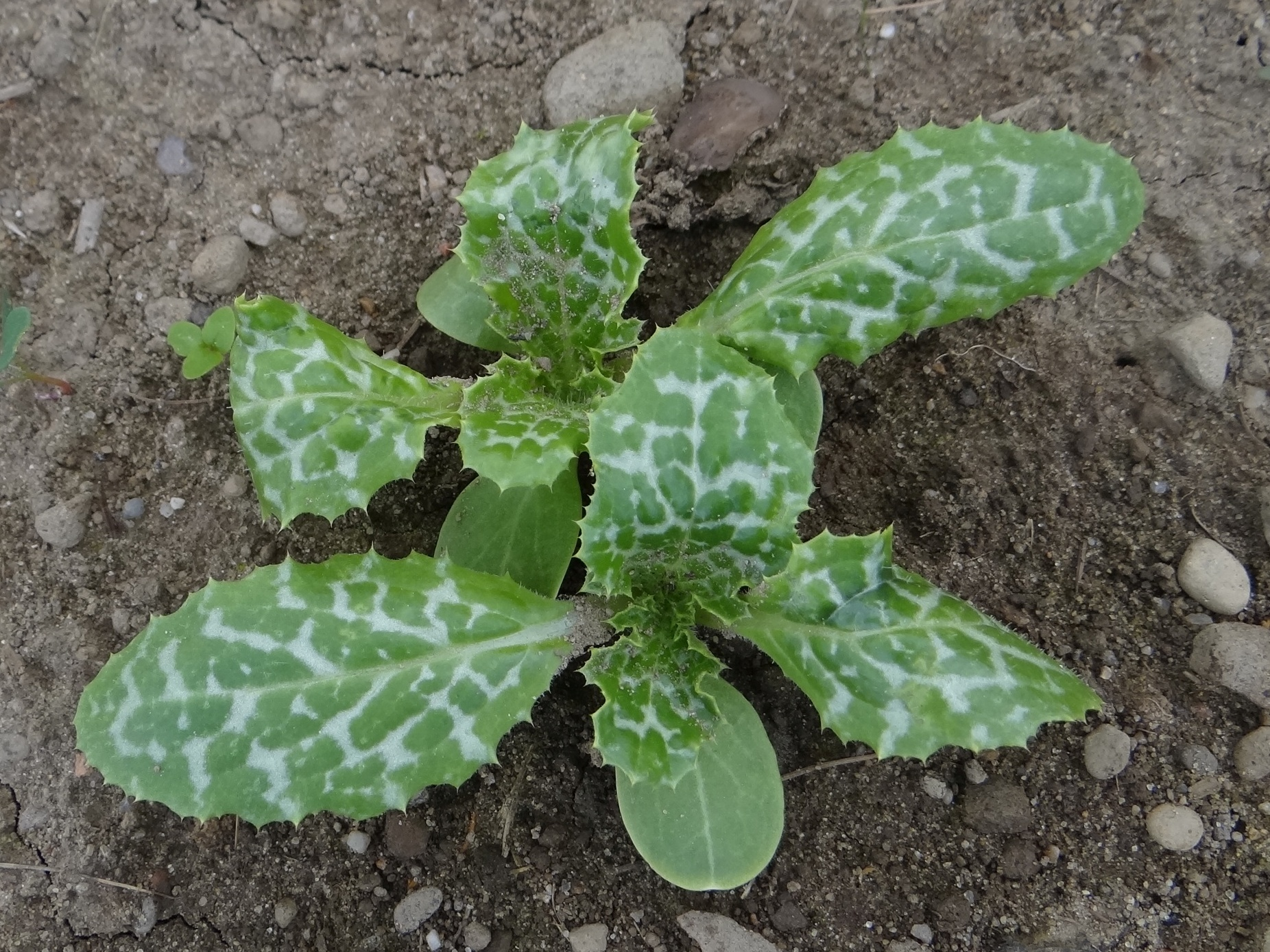 Scolymus maculatus (Ogród biblijny w Muszynie)